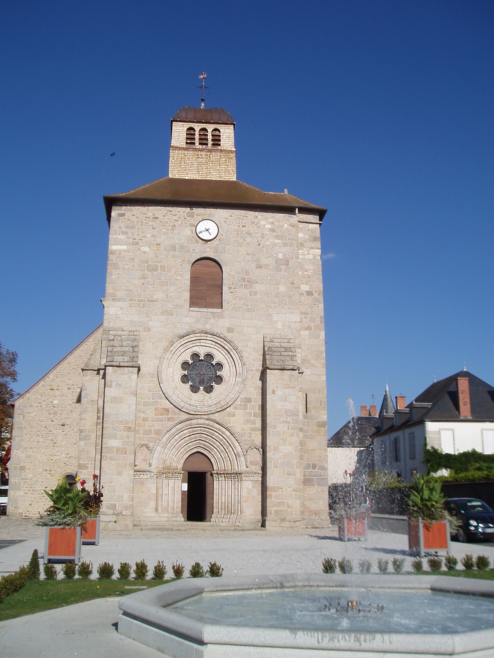 Gouzon place de l'église